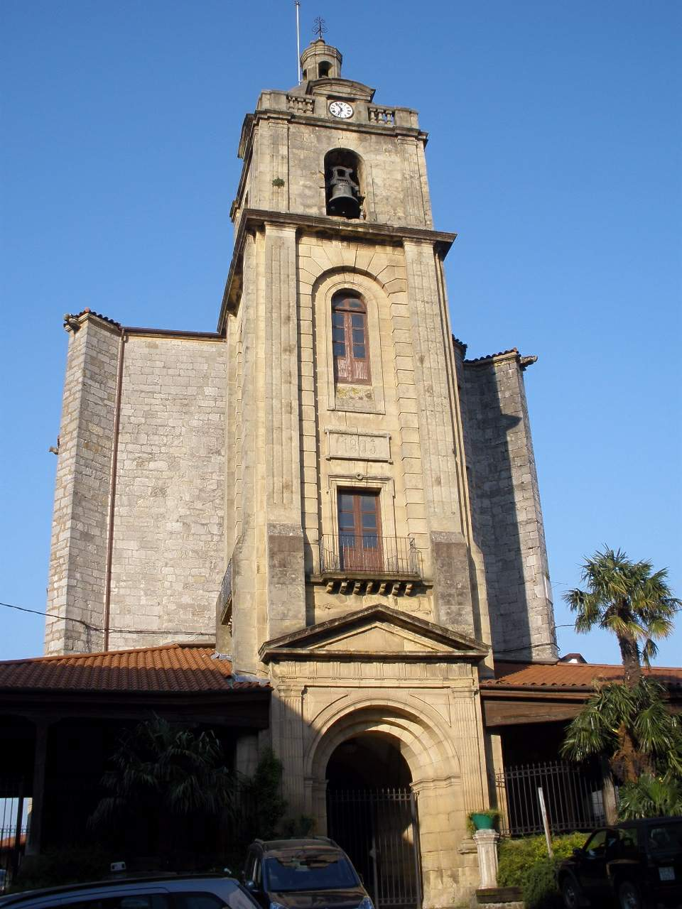 Iglesia de San Miguel, Urnieta (Gipuzkoa)